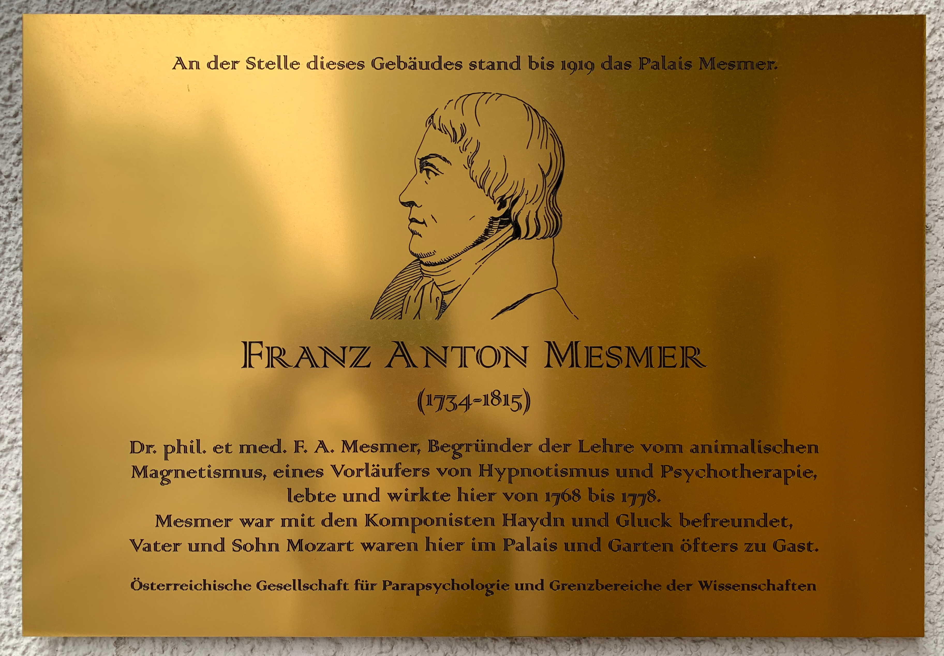 Gedenktafel für Franz Anton Mesmer an der Stelle des ehemaligen Palais Mesmer in der Rasumofskygasse 29 in Wien Landstraße.